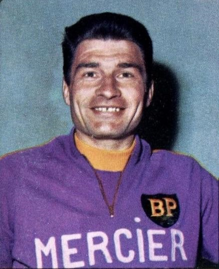 Raymond Poulidor en 1968 - PANINI 1968/1979, n°162